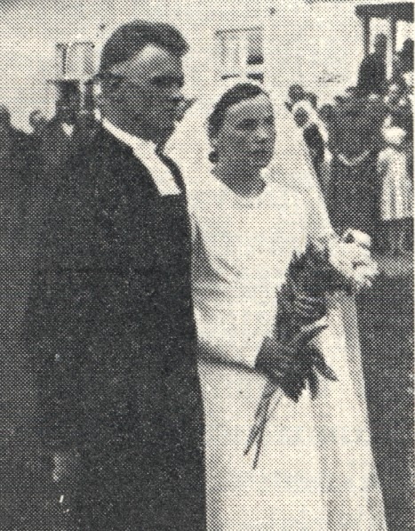 Pastori Kauko Kanervo ja Aino Kanervo